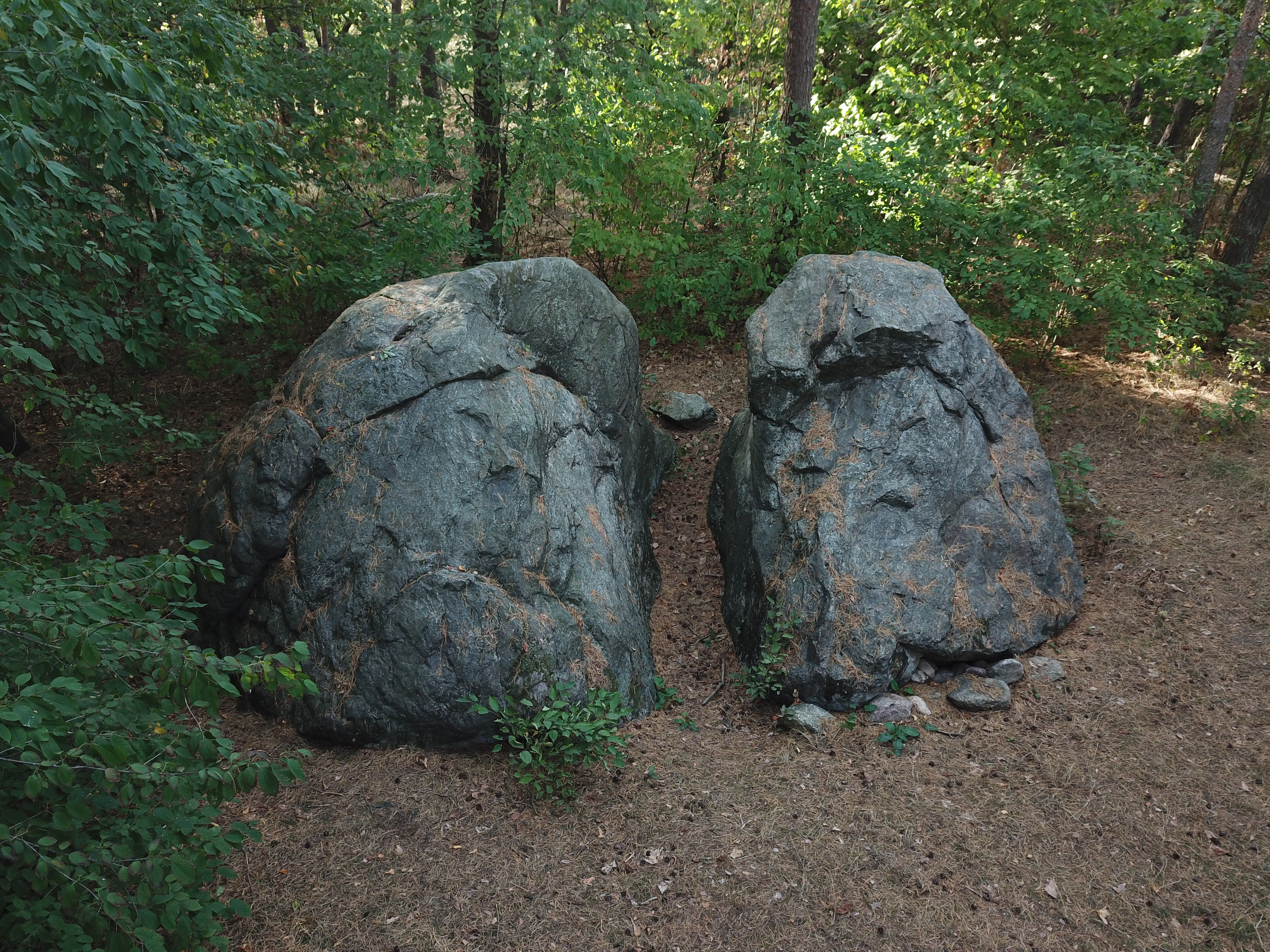 Heimchensteine bei Glienicke fotografiert am 17.09.2018 17:00 mit Mavic Pro